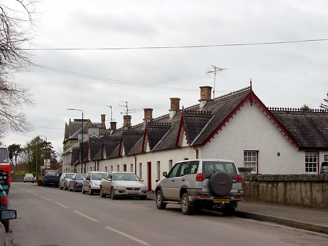 Main Street, Benburb